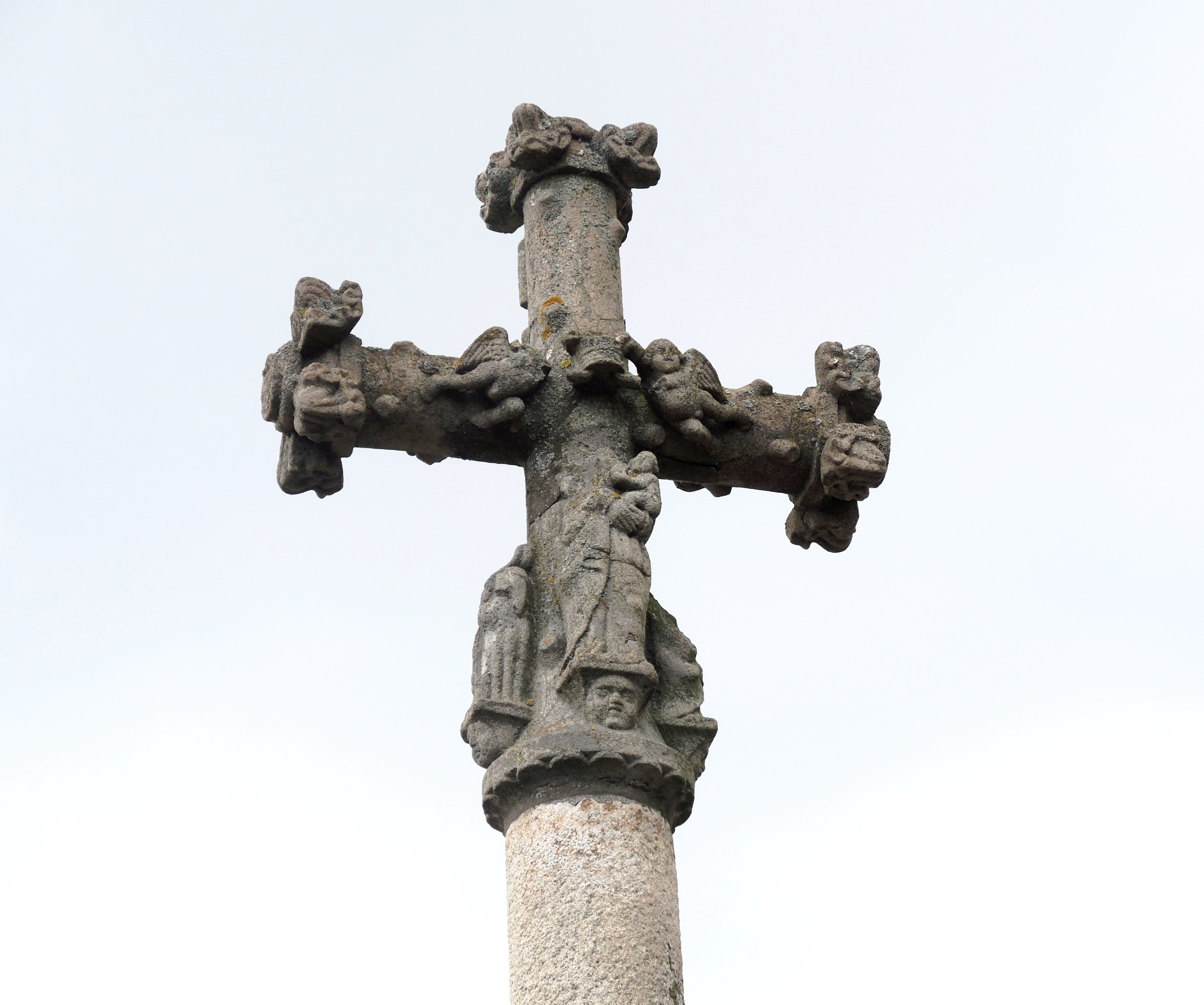 Préaux croix de peste. Erigée en 1587 à la suite d'une épidémie de peste, elle se trouve à côté de l'église